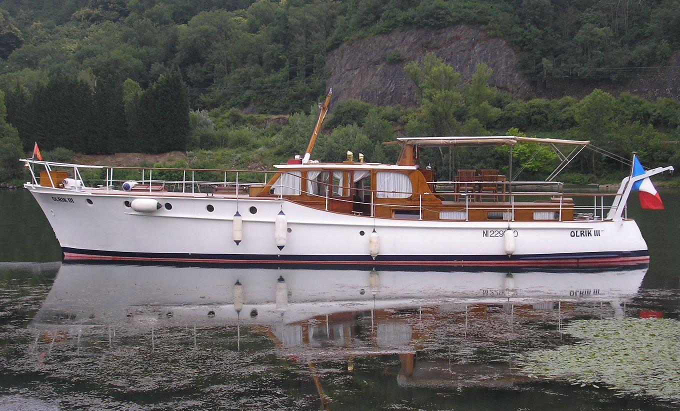 Motor Yacht 1939